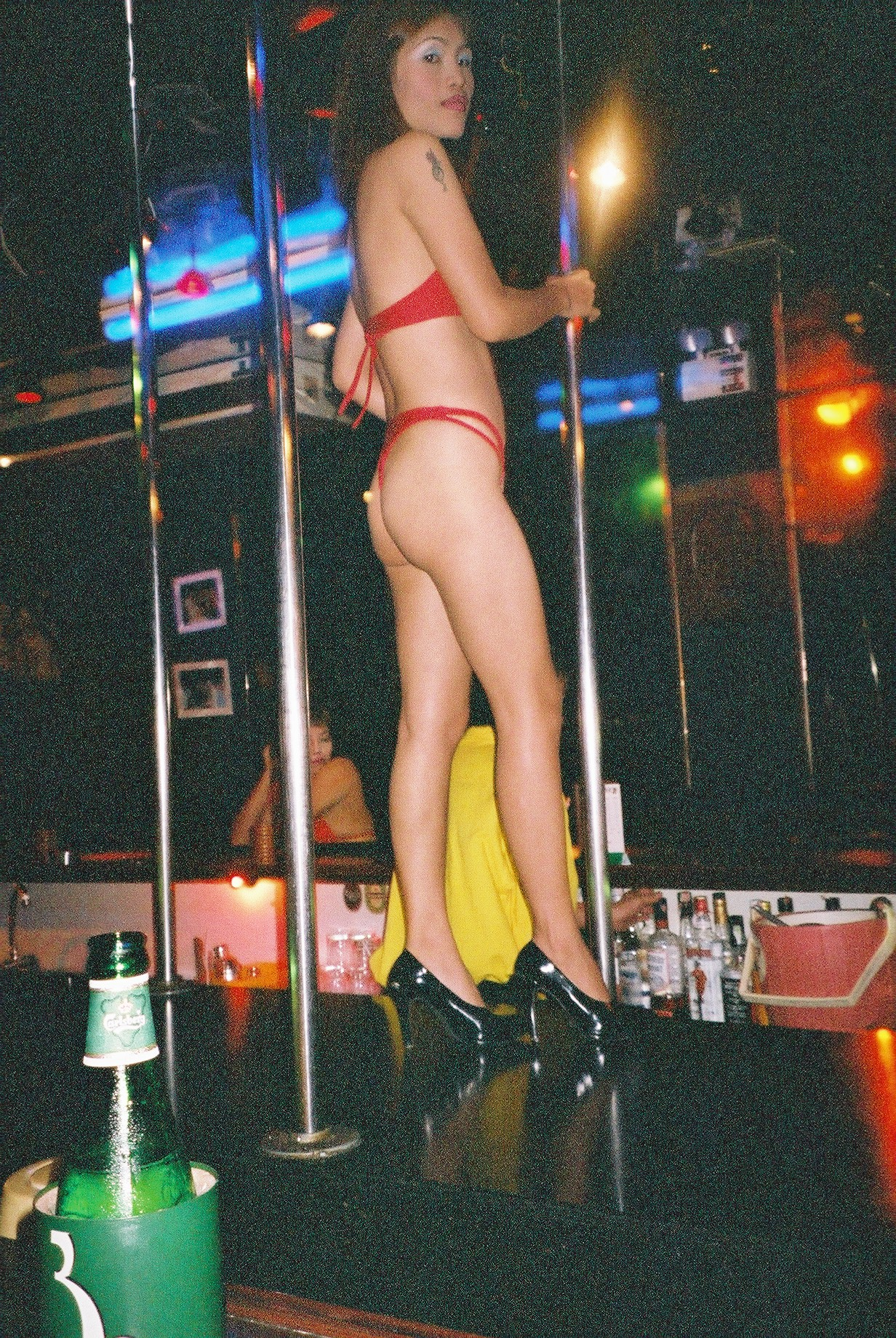 A dancer at a go-go bar along Patpong. Bangkok, Thailand